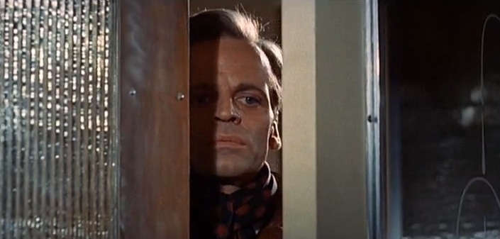 Screenshot dal film A doppia faccia (1969) di Riccardo Freda